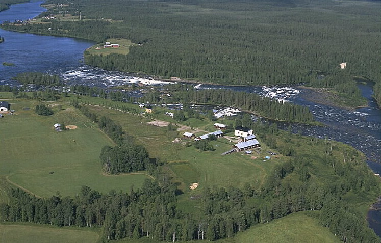 Bruket Motiv: Kengis Nyckelord: Flygbilder, Riksintressen Kategori: BruksmiljöBruket.